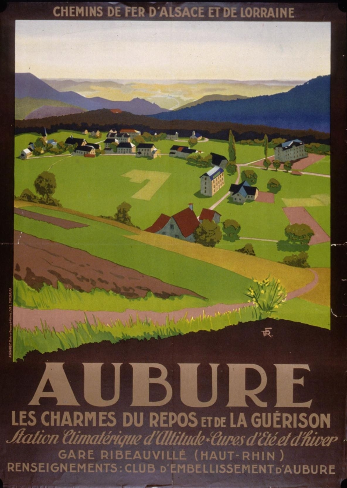 Aubure, les charmes du repos et de la guerison... (. Bibliothèque nationale et universitaire de Strasbourg